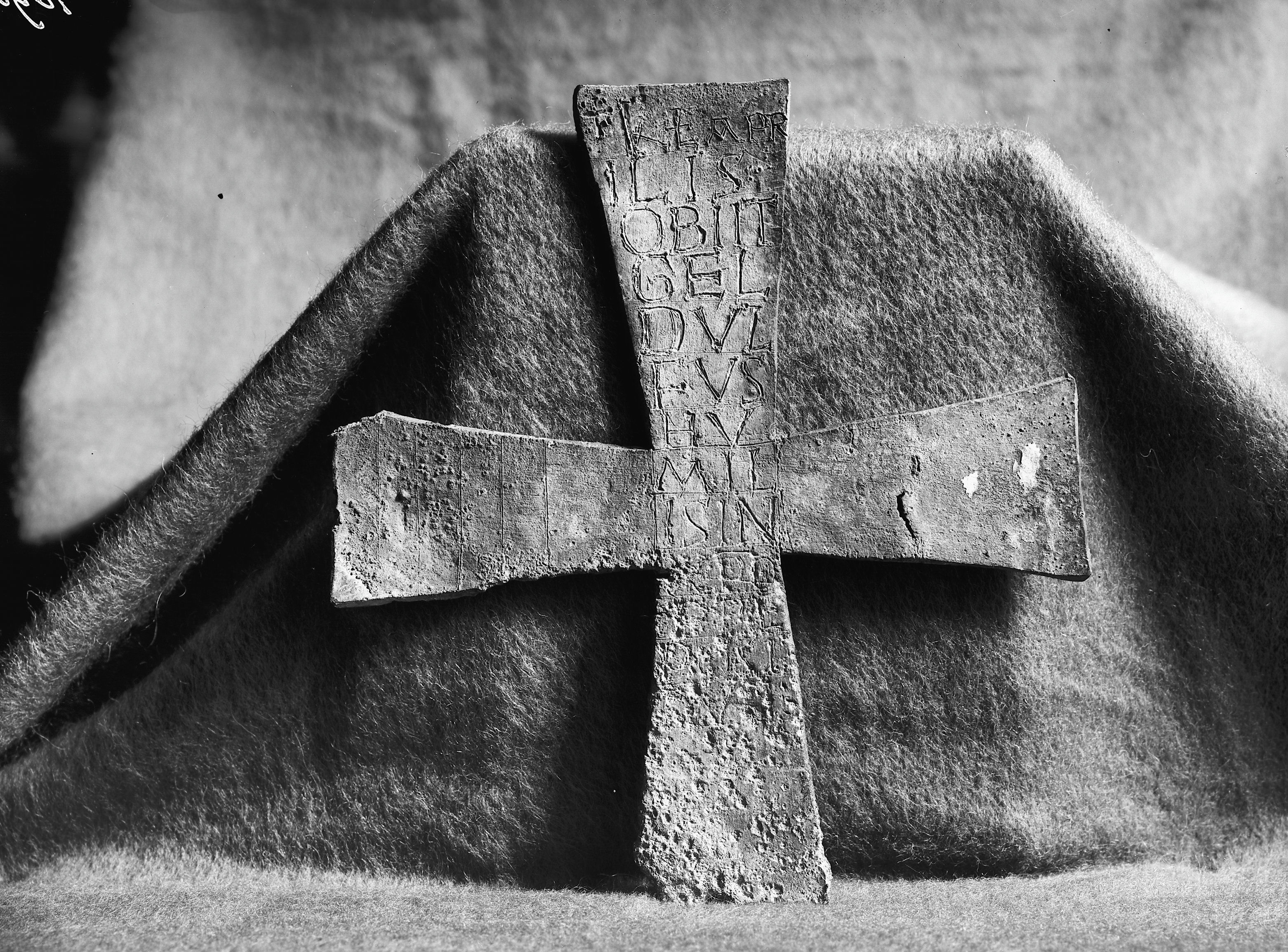 Schatkamer Sint-Servaaskerk: loden grafkruis van 11e-eeuwse proost Gelfulfus, in 1702 teruggevonden en herbegraven, in 1903 door P. Doppler opnieuw opgegraven.